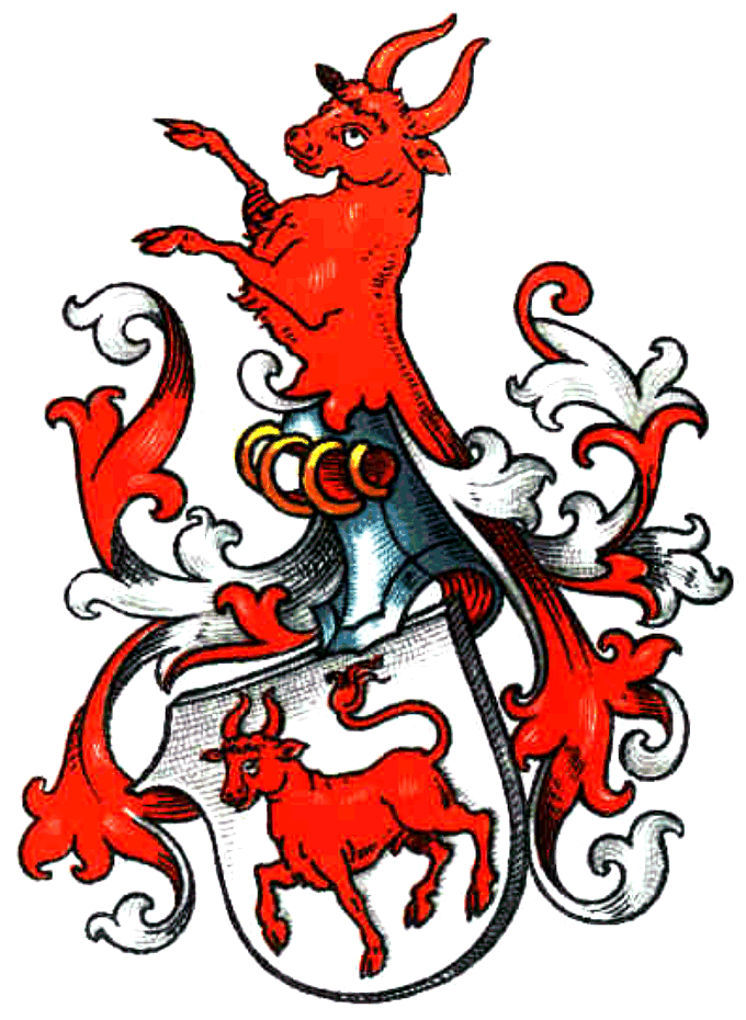 Wappen derer von Aulock